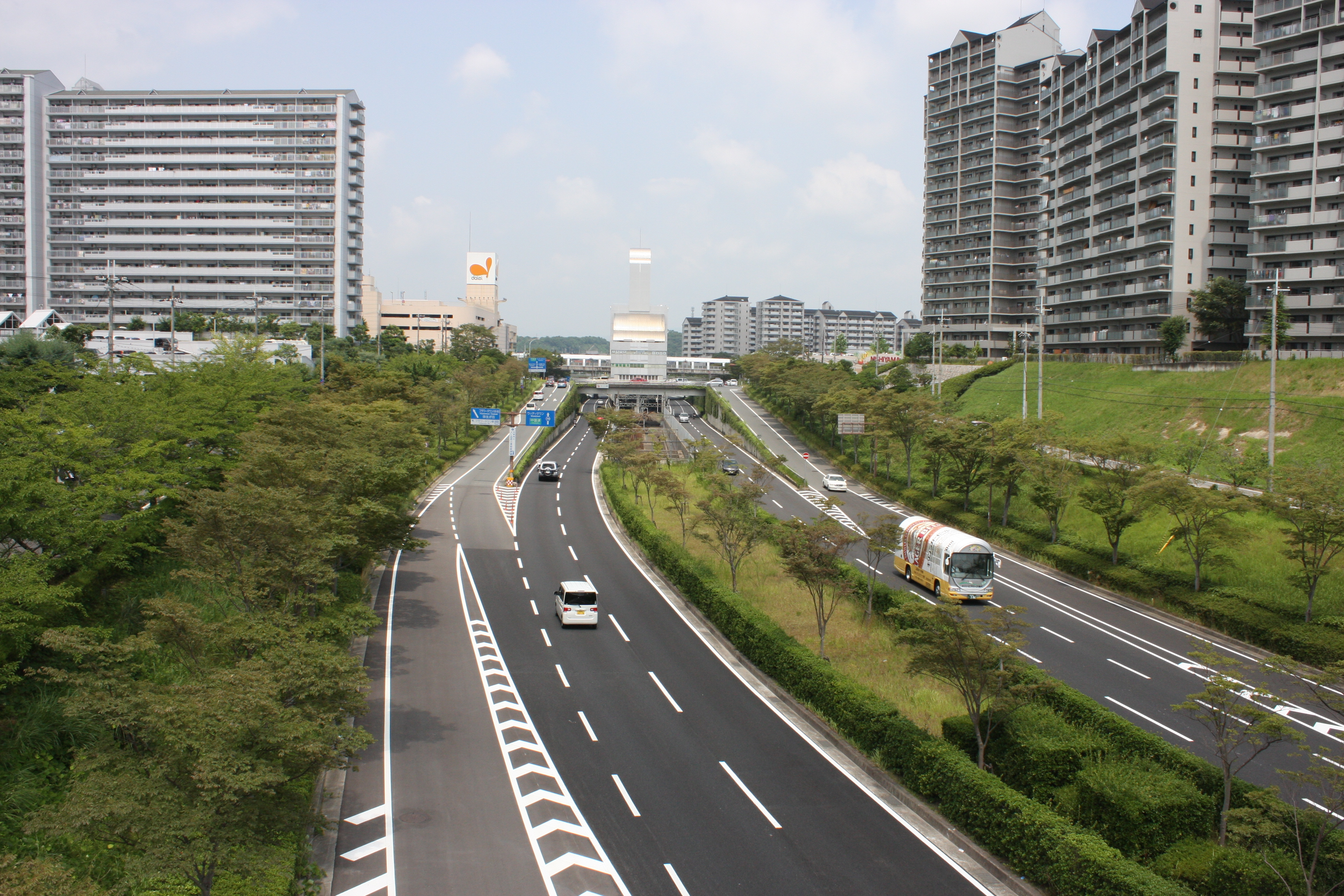 フラワータウン駅周辺